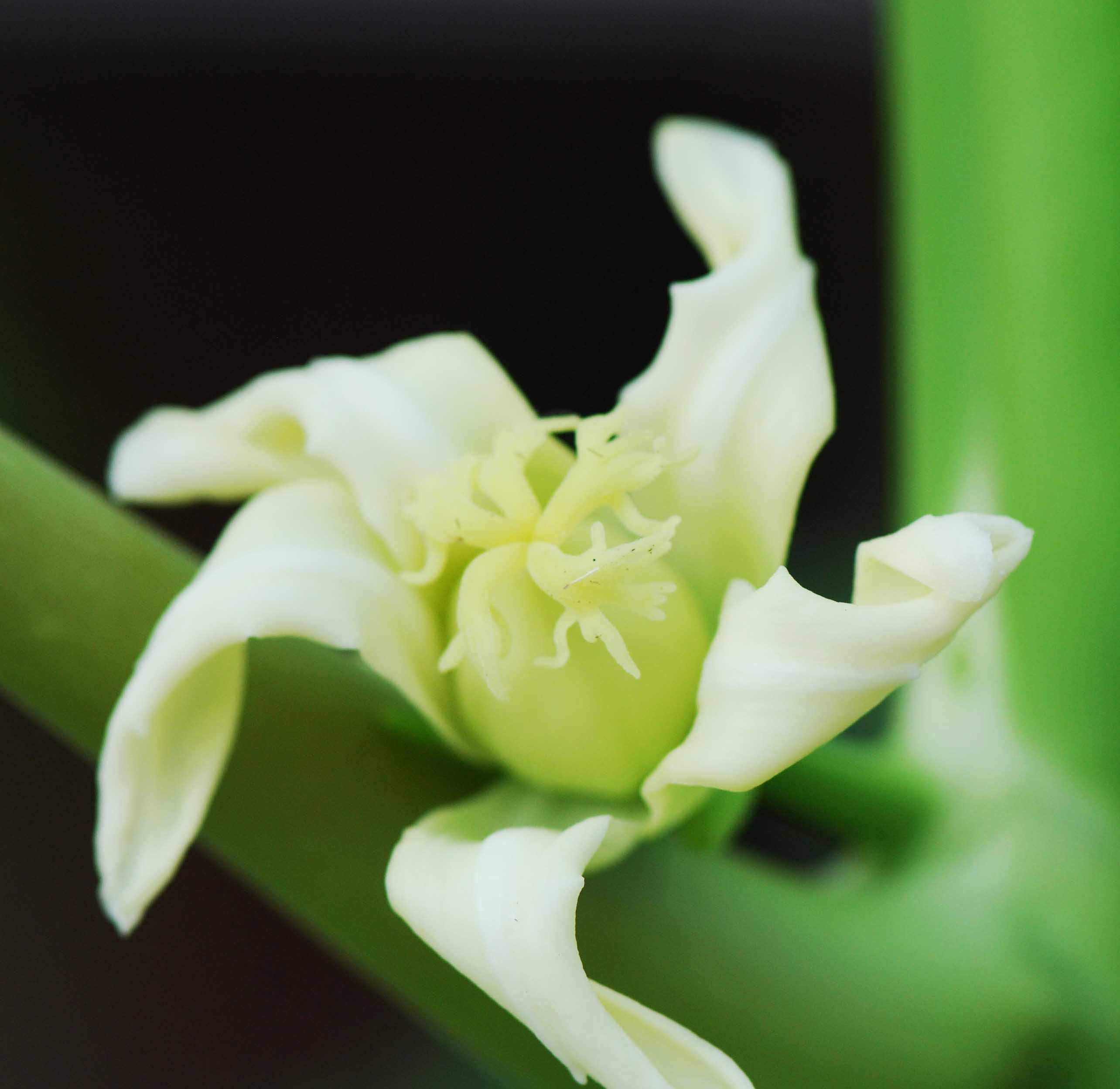 Carica papaya, papayer, fleur femelle, Ile Maurice